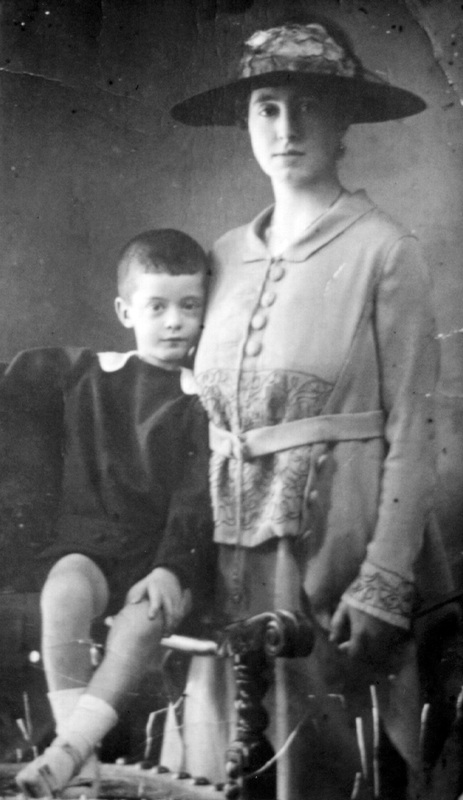 Virxinia e o seu fillo Alfonso Xesús (1914-1928)